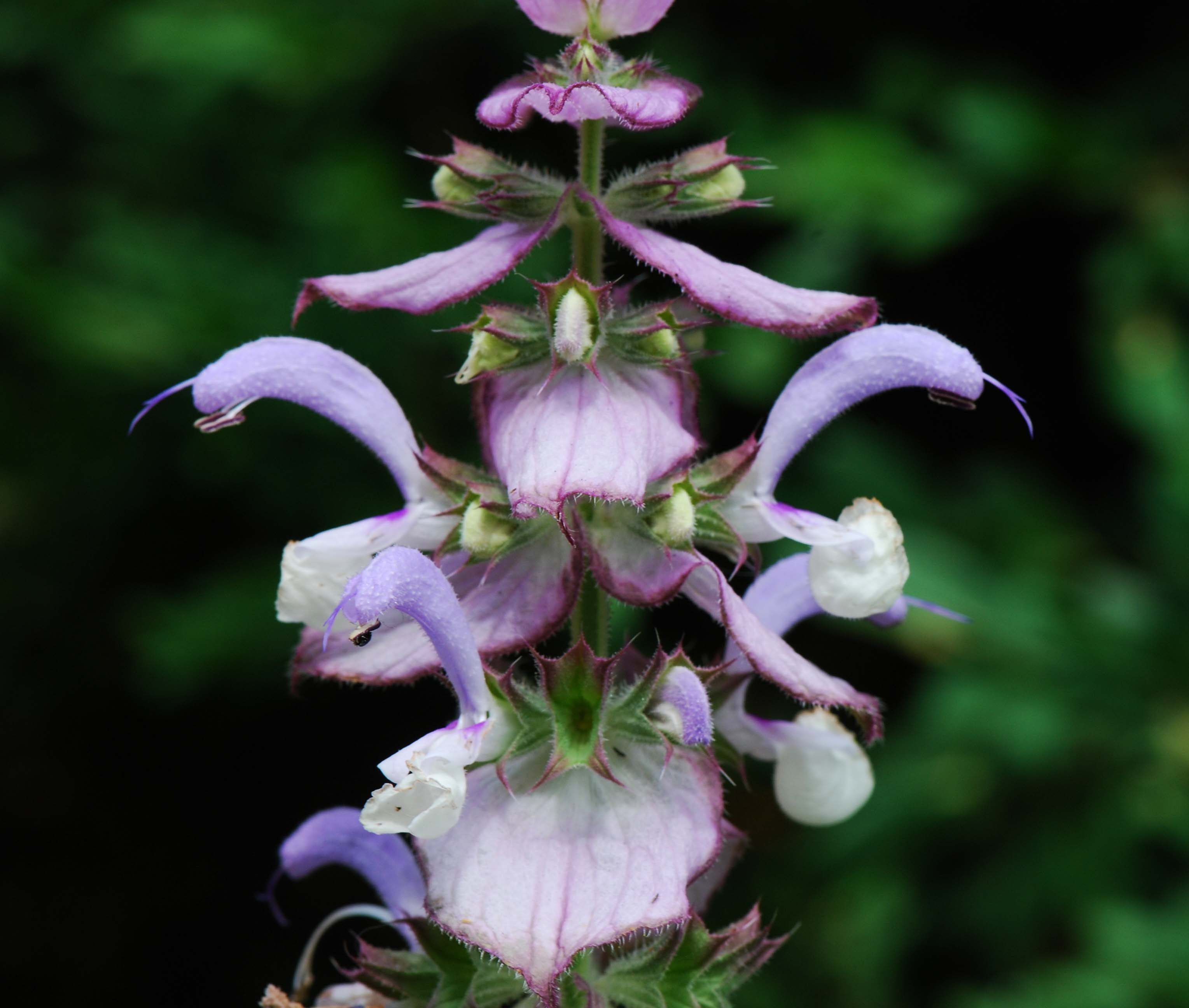 Salvia sclarea, inflorescence, Boutiers 16